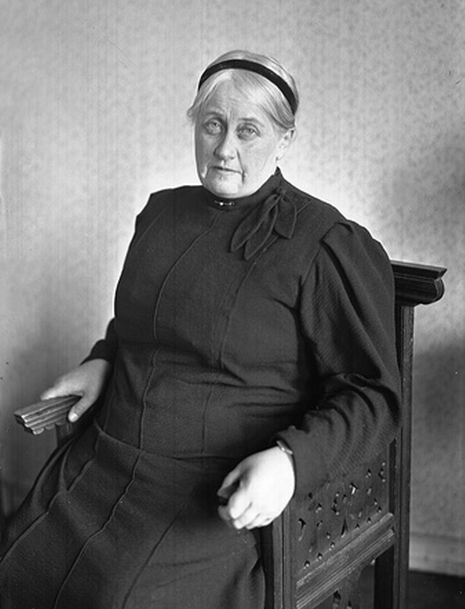 Анна Вырубова